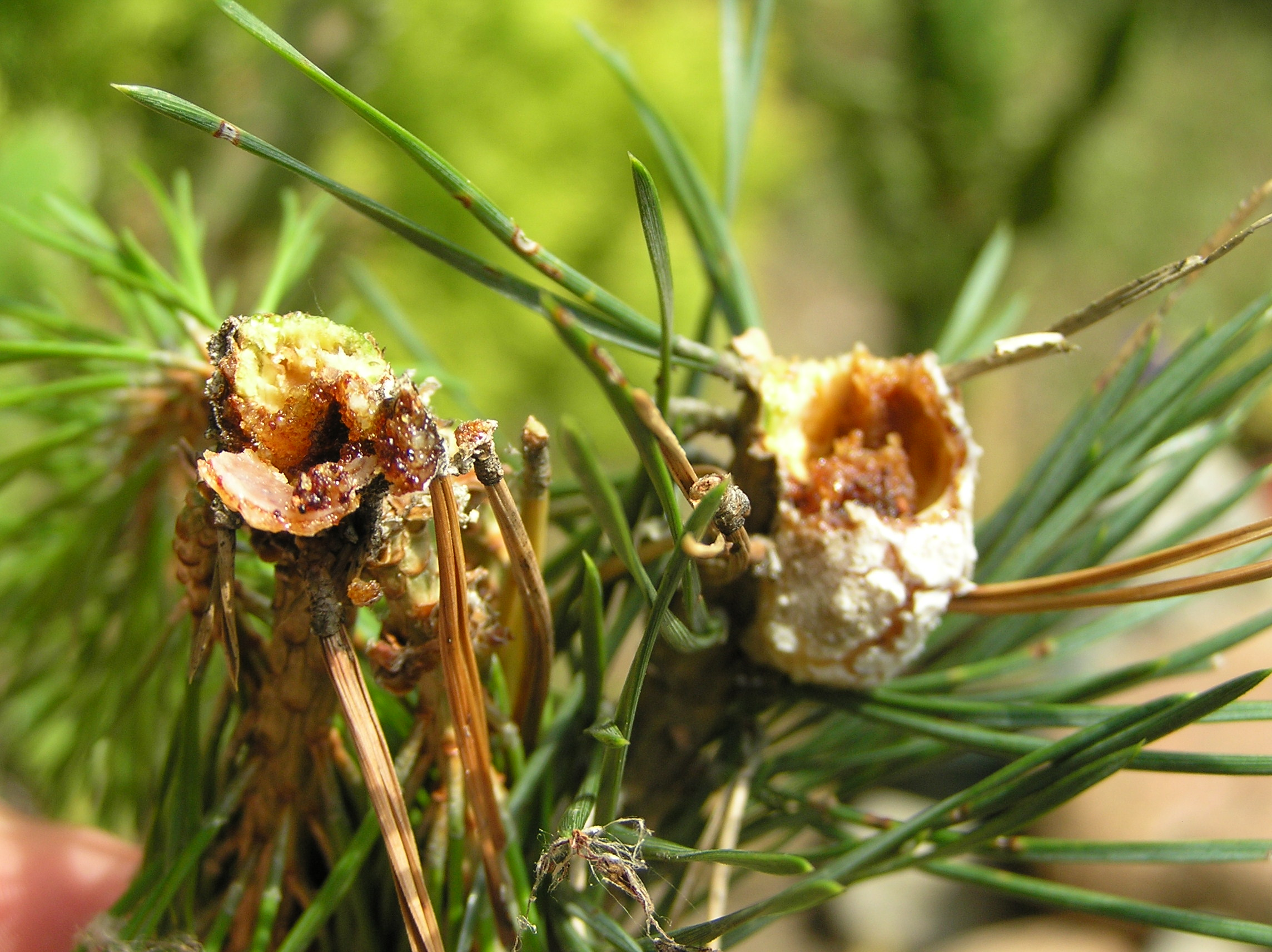 Retinia resinella (syn. Petrova resinella, Petrova rexinella), Zwójka żywiczanaczka - żywiczny galas wewnątrz którego żeruje larwa.